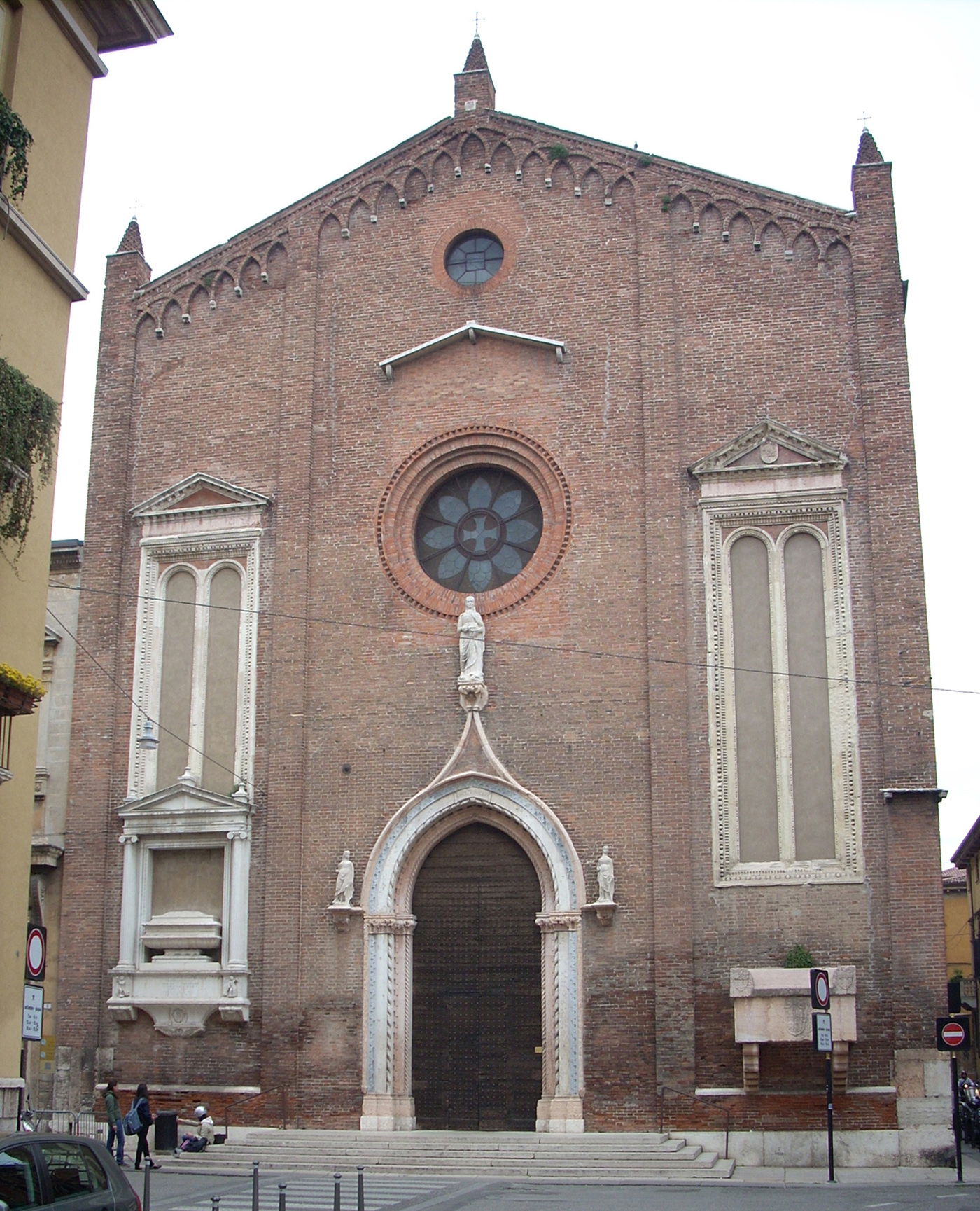 SideWall in San Giovanni in Foro, Verona, Italy